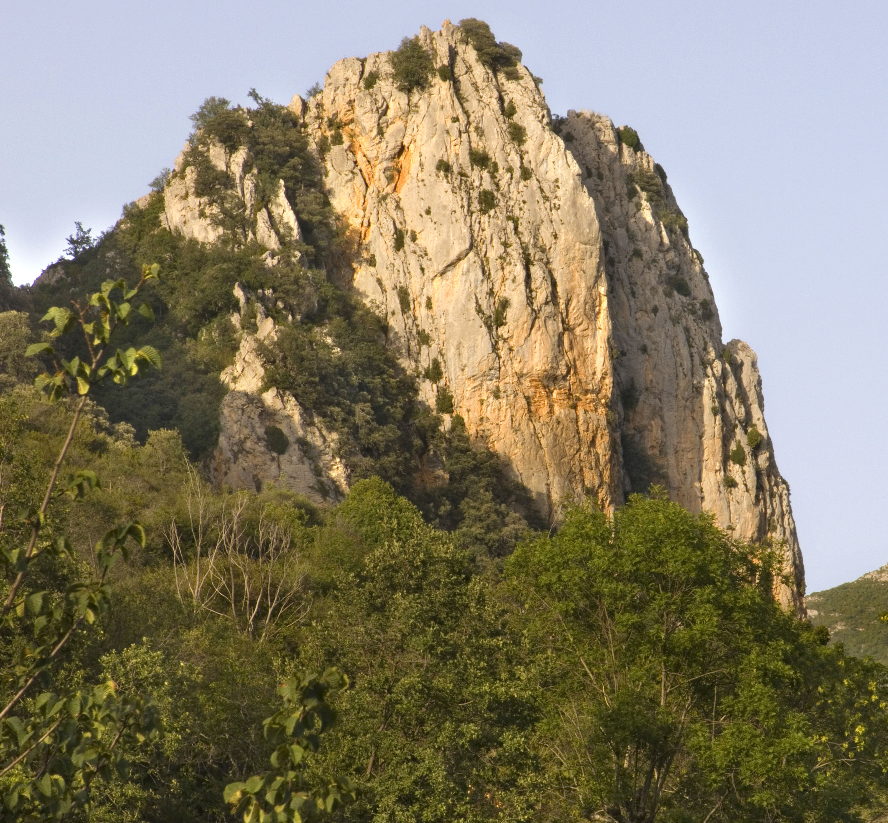 Imatge feta des de Vallabriga (municipi de Beranui), a la Baixa Ribagorça de l'Aragó.